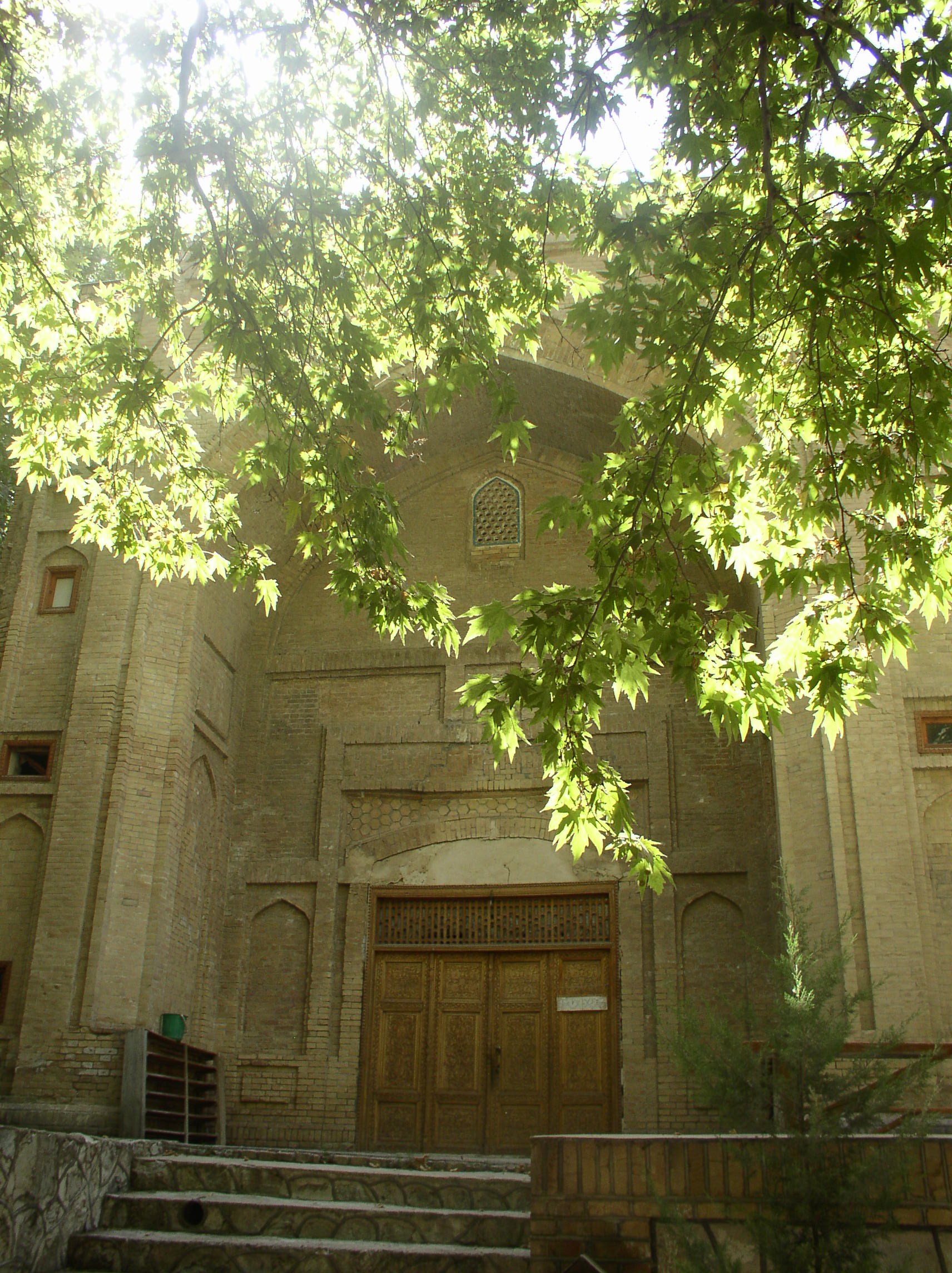 platan grove in Urgut, Uzbekistan